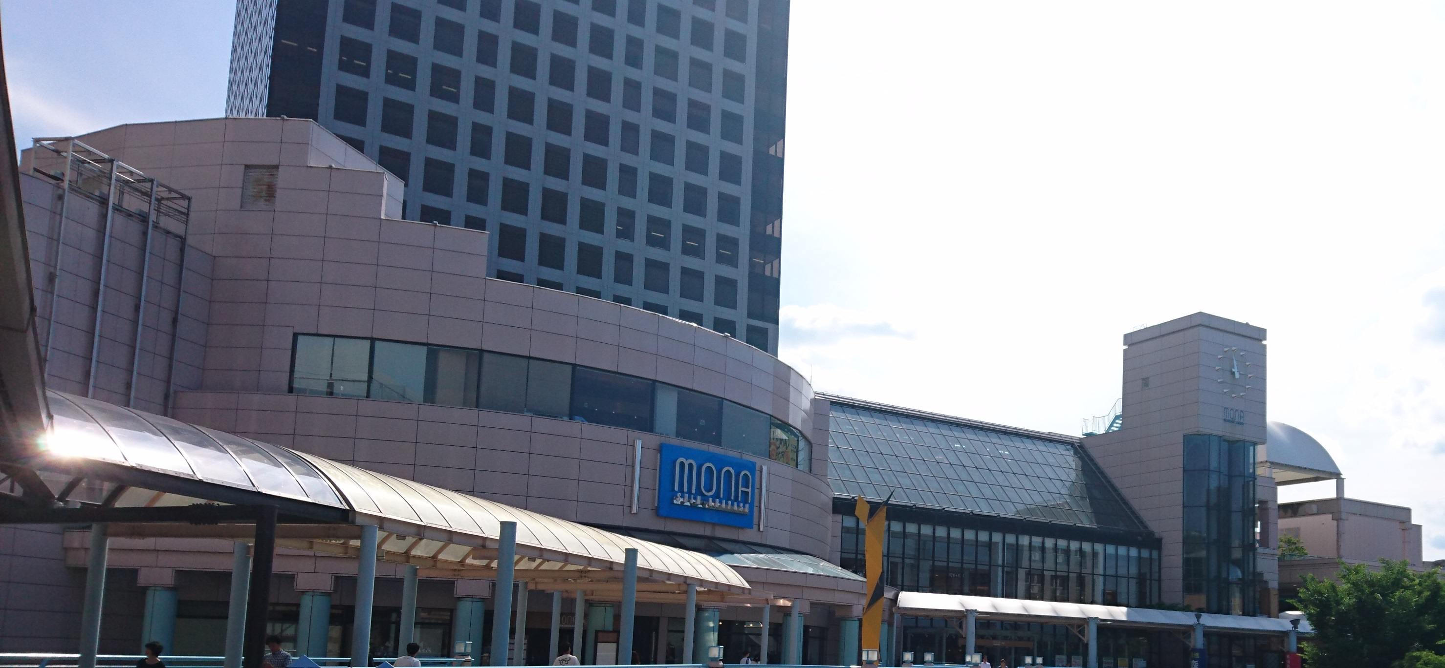 モナ新浦安 外観